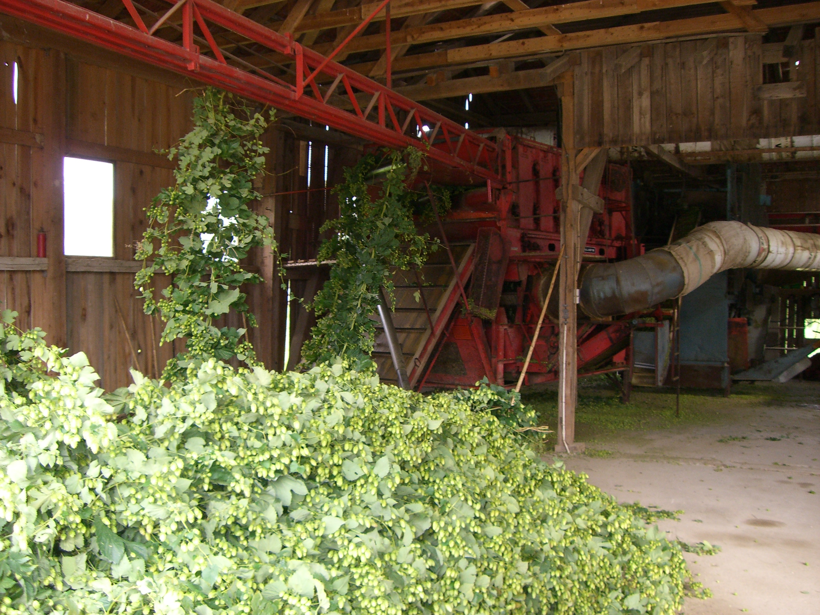 Hopfenmaschine